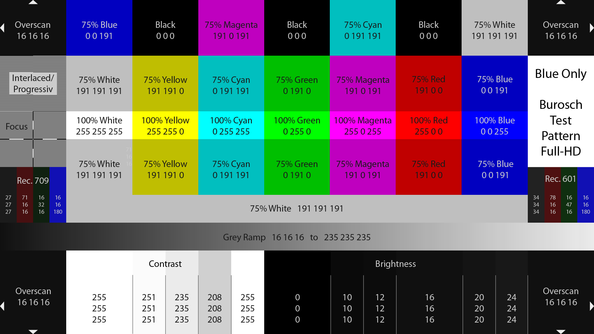 Das Burosch-Testbild mit Erläuterungen. Eigenhändig erstellt in Anlehnung an